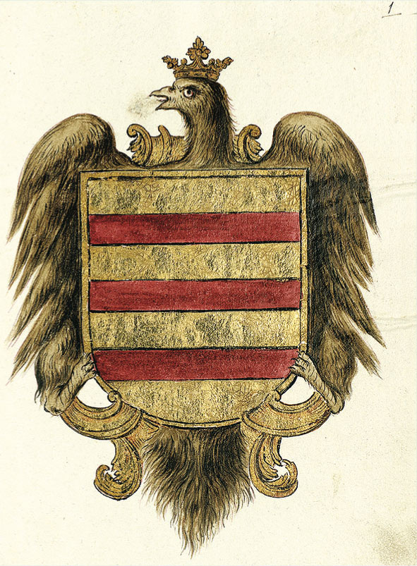 Escudo casa de Priego